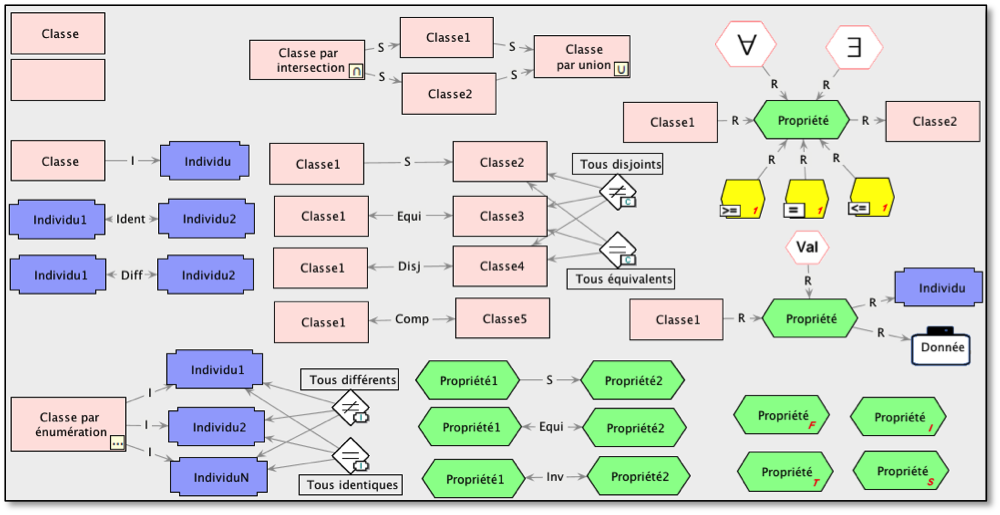 Symboles MOT_onto